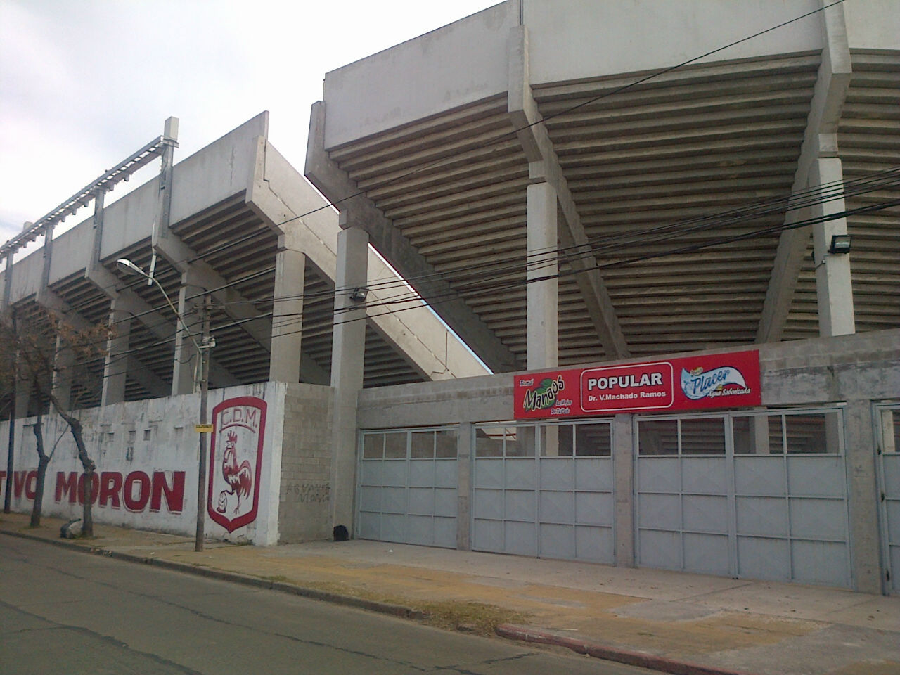 Estadio Nuevo Francisco Urbano